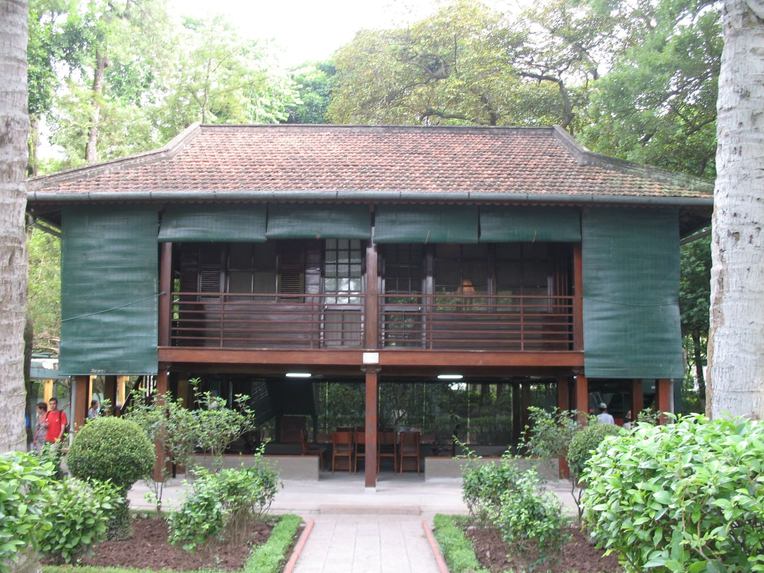 Ho Chi Minhs Wohnhaus